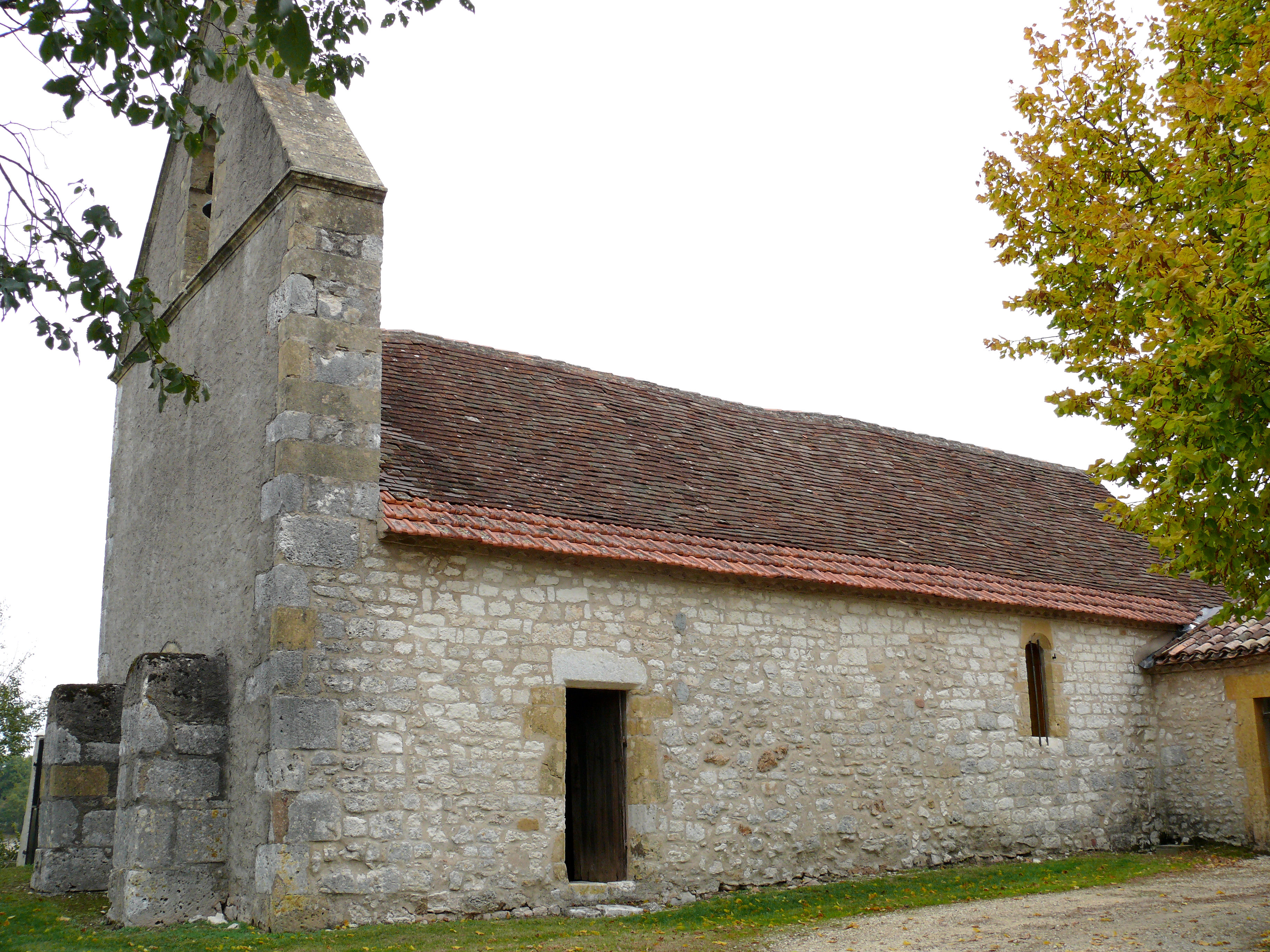 Saint-Cassien (Dordogne) - Eglise de Saint-Cassien